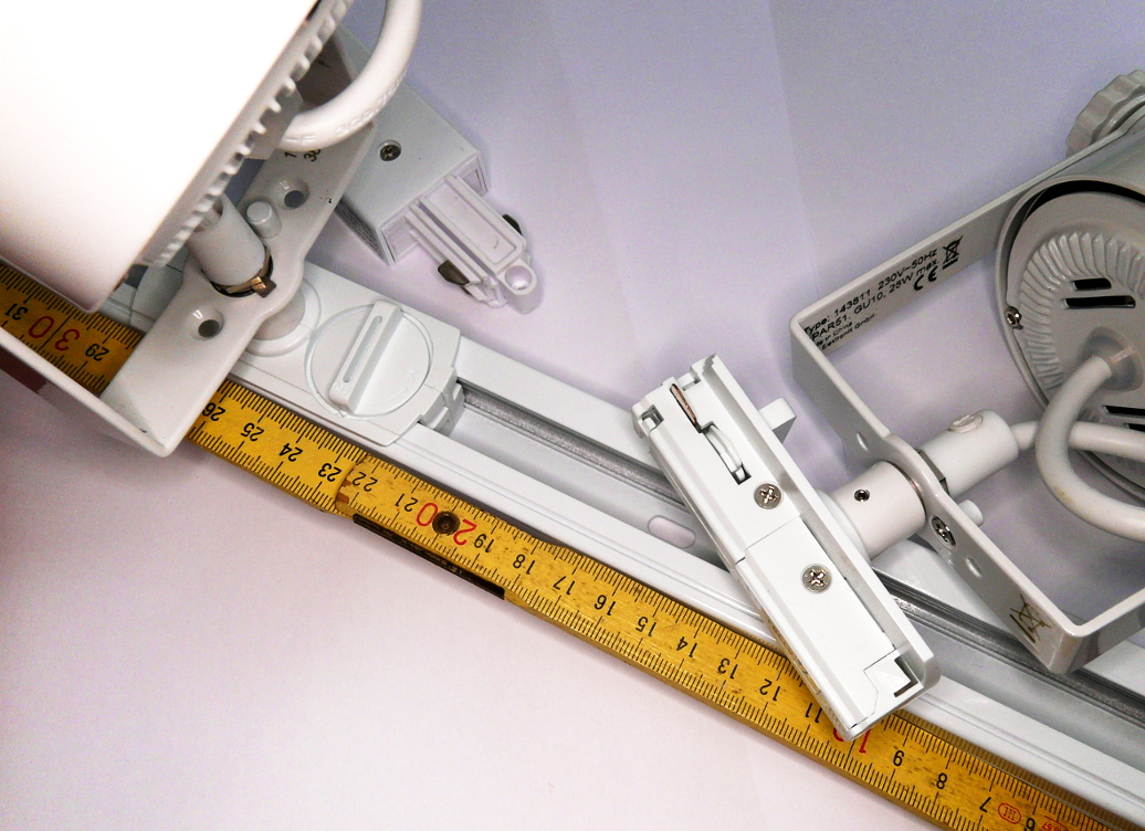 230 Volt Stromschiene. Eine Lampe steckt in der Schiene (links), eine weitere liegt mit ihrem Steckschuh daneben.